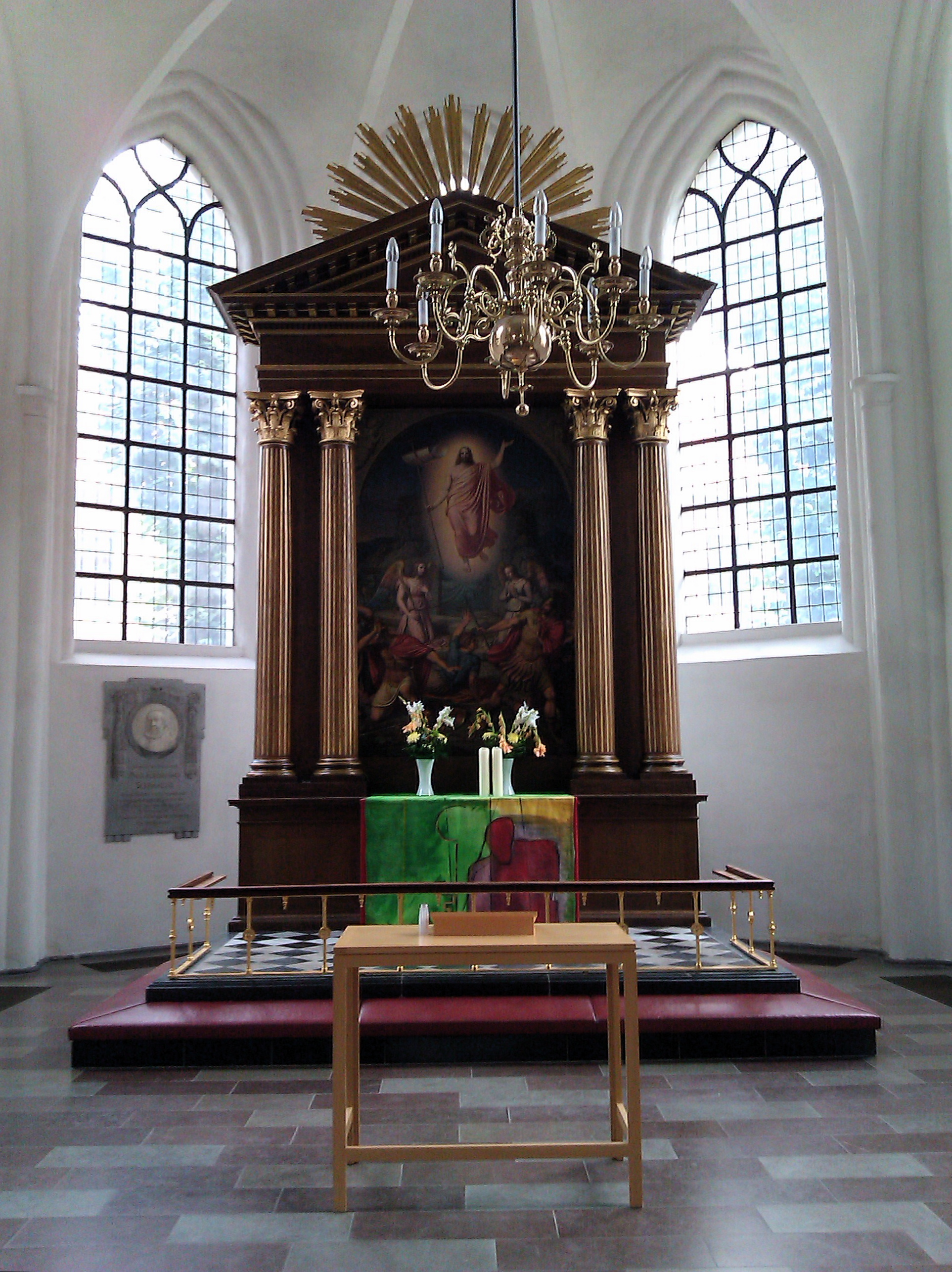 Altertavle, Sankt Petri Kirke, København